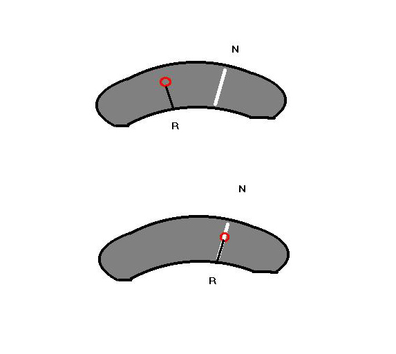 Superimpose exposure meter diagram